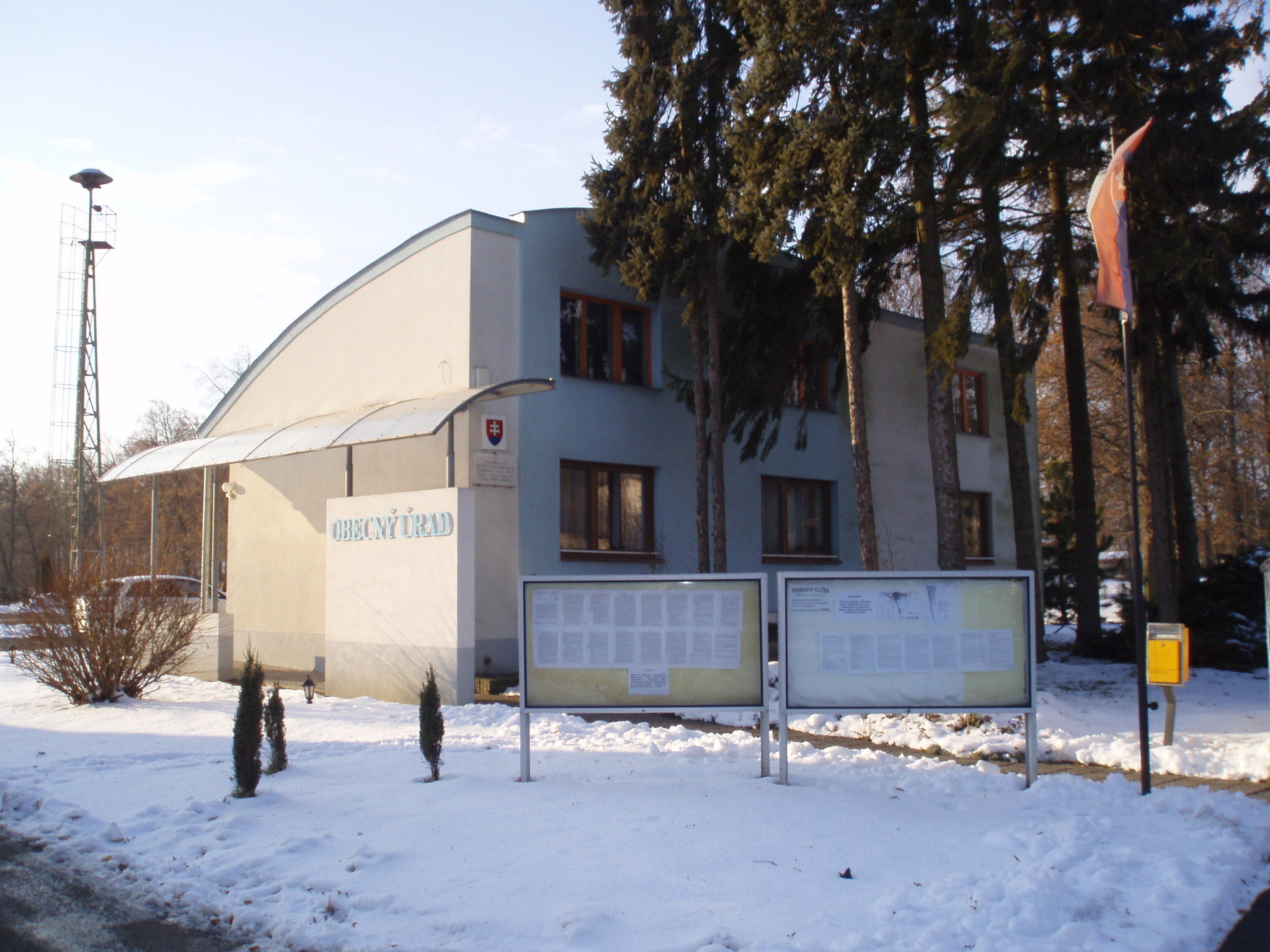 Obecný úrad. Nový Ruskov okres Trebišov